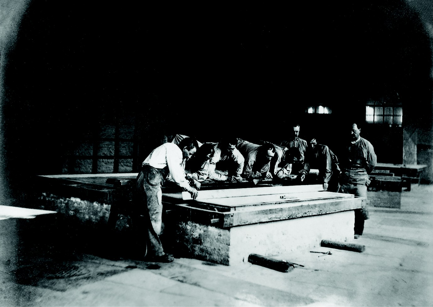 Glasherstellung, Tischwalzverfahren